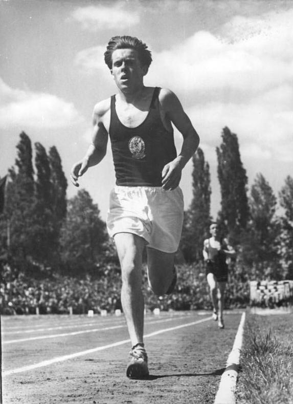 Gerhard Hönicke Zentralbild TBD-Wlocka 8.6.1955 Leichtathletik-Sportfest in Erfurt Im Erfurter Georgi-Dimitroff-Stadion fand am 29. und 30.5.1955 ein großes internationales Leichtathletik-Sportfest mit Teilnehmern aus Ungarn, CSR, Polen, Westdeutschland und der DDR statt. UBz: Im 10.000 m-Lauf führt Gerhard Hönicke (DDR).